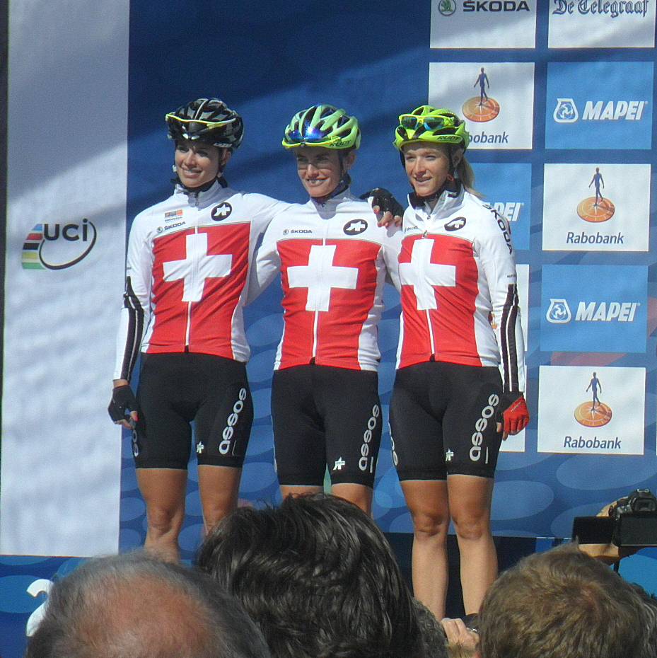 Ploegenpresentatie Zwitserland voor de start van het Wereldkampioenschap 2012 in Valkenburg, Nederland.